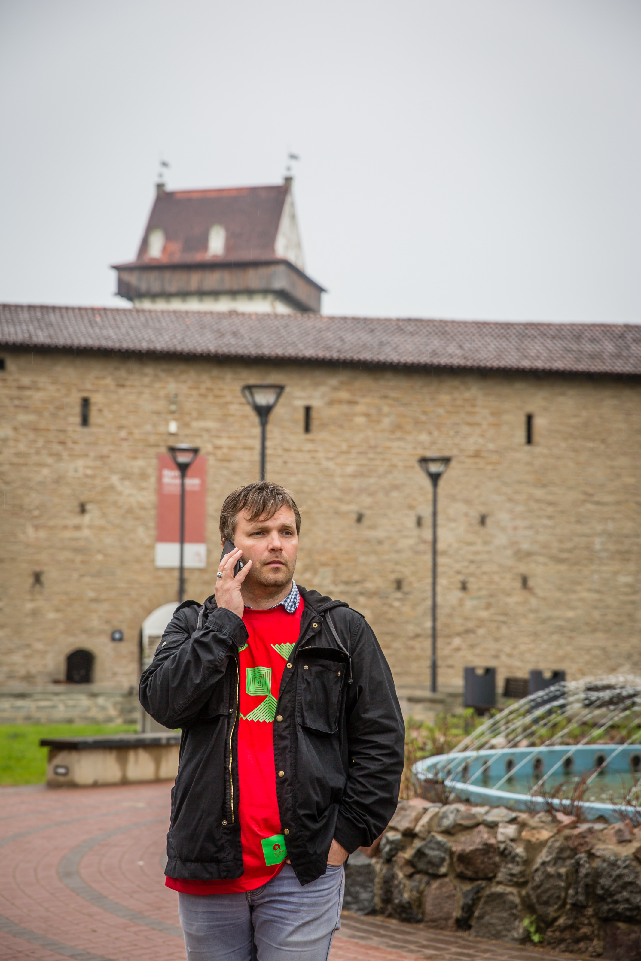 Ivo Posti Narva [eel]arvamusfestivalil.